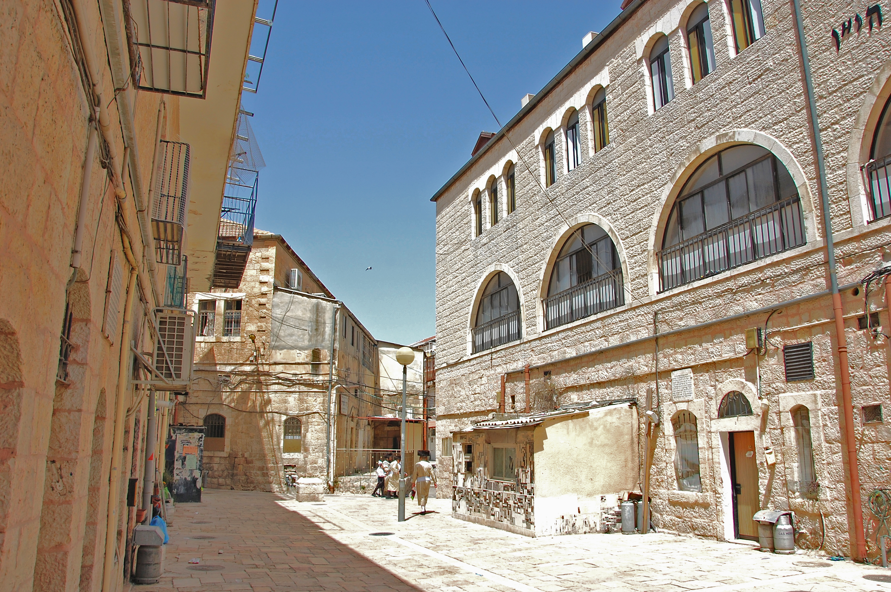 Batei Ungarin, jerusalem